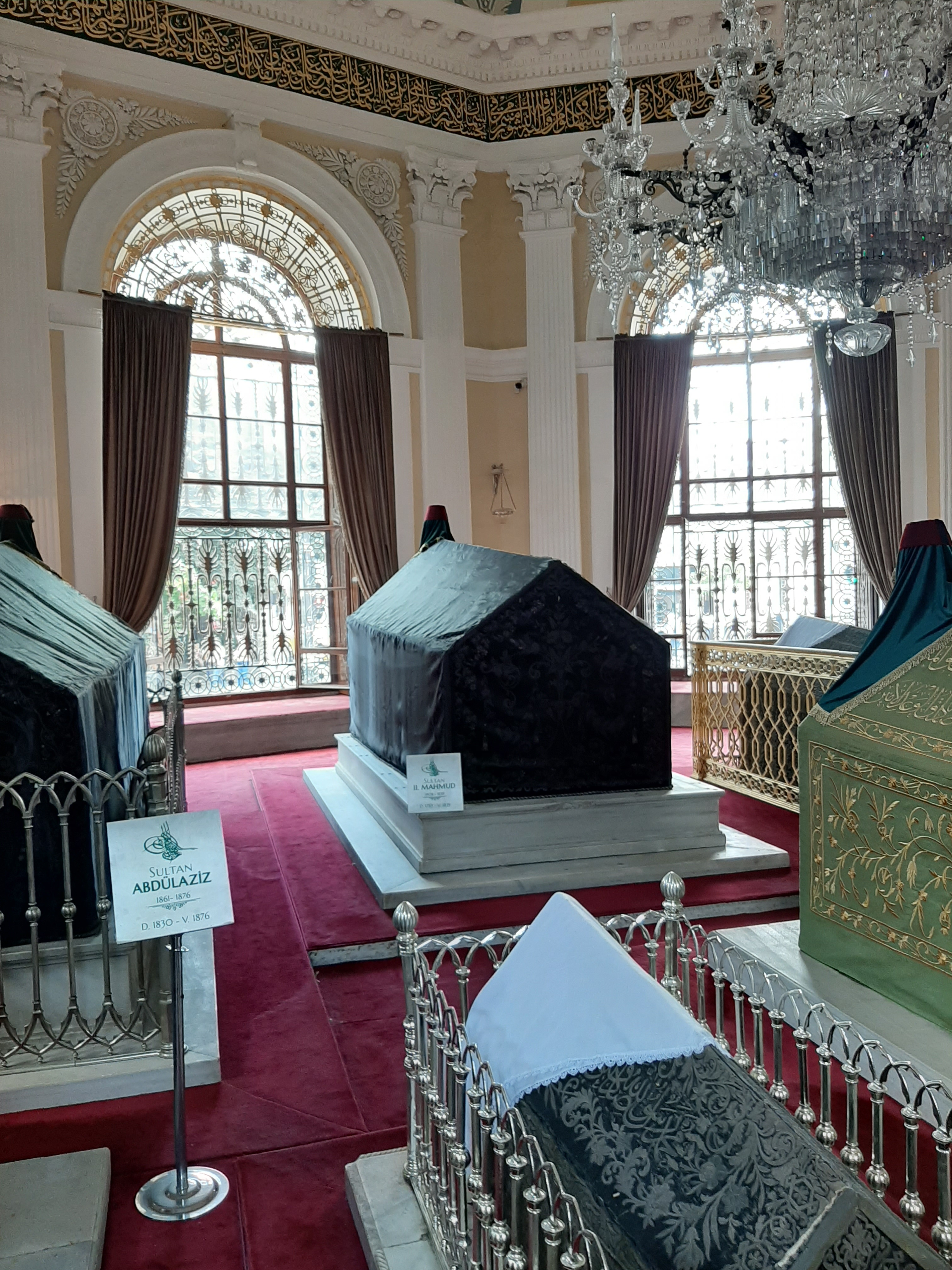 Todesstätte von Sultan Mahmud II.